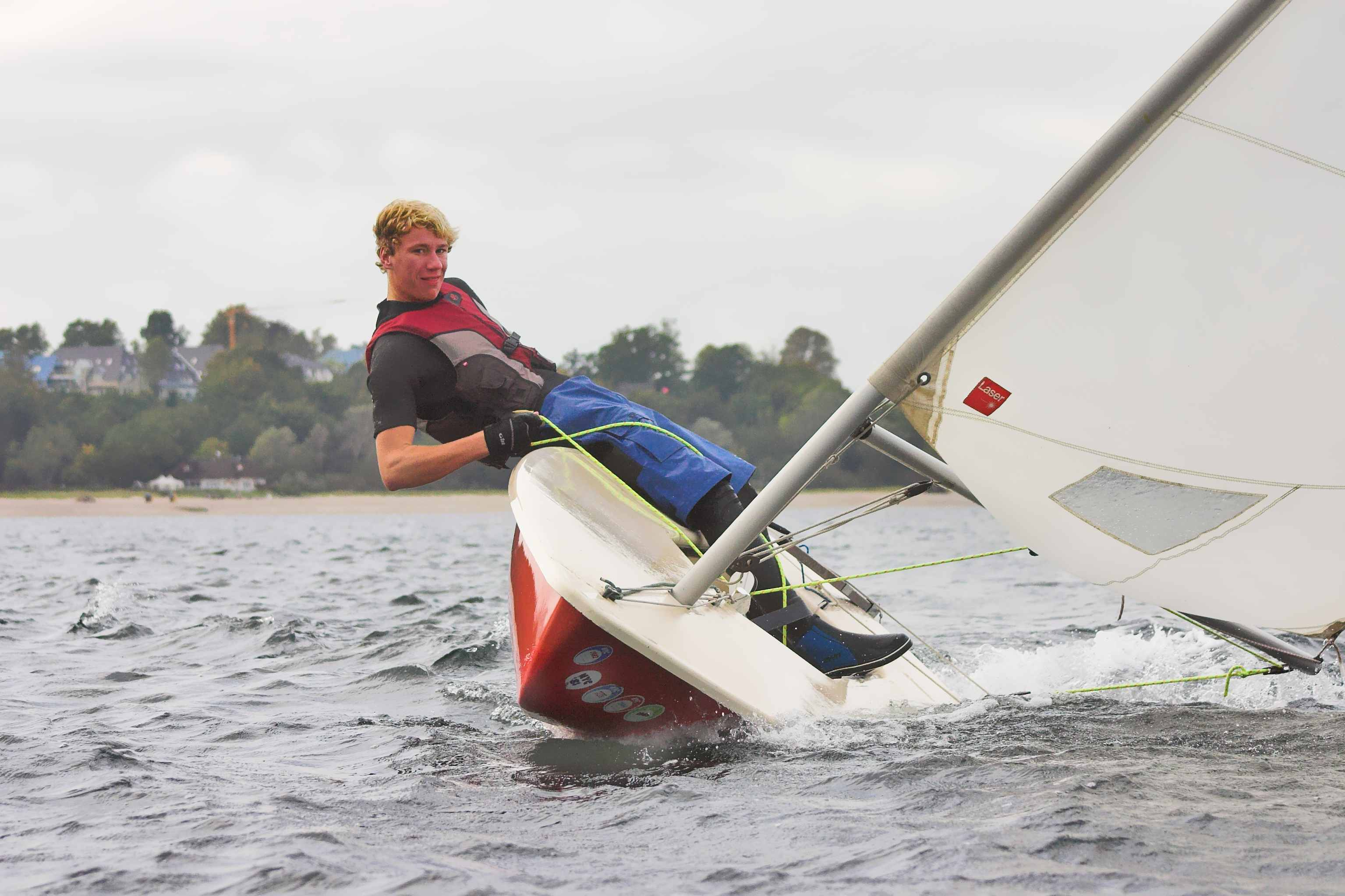 Schüler des OGT auf Segelboot